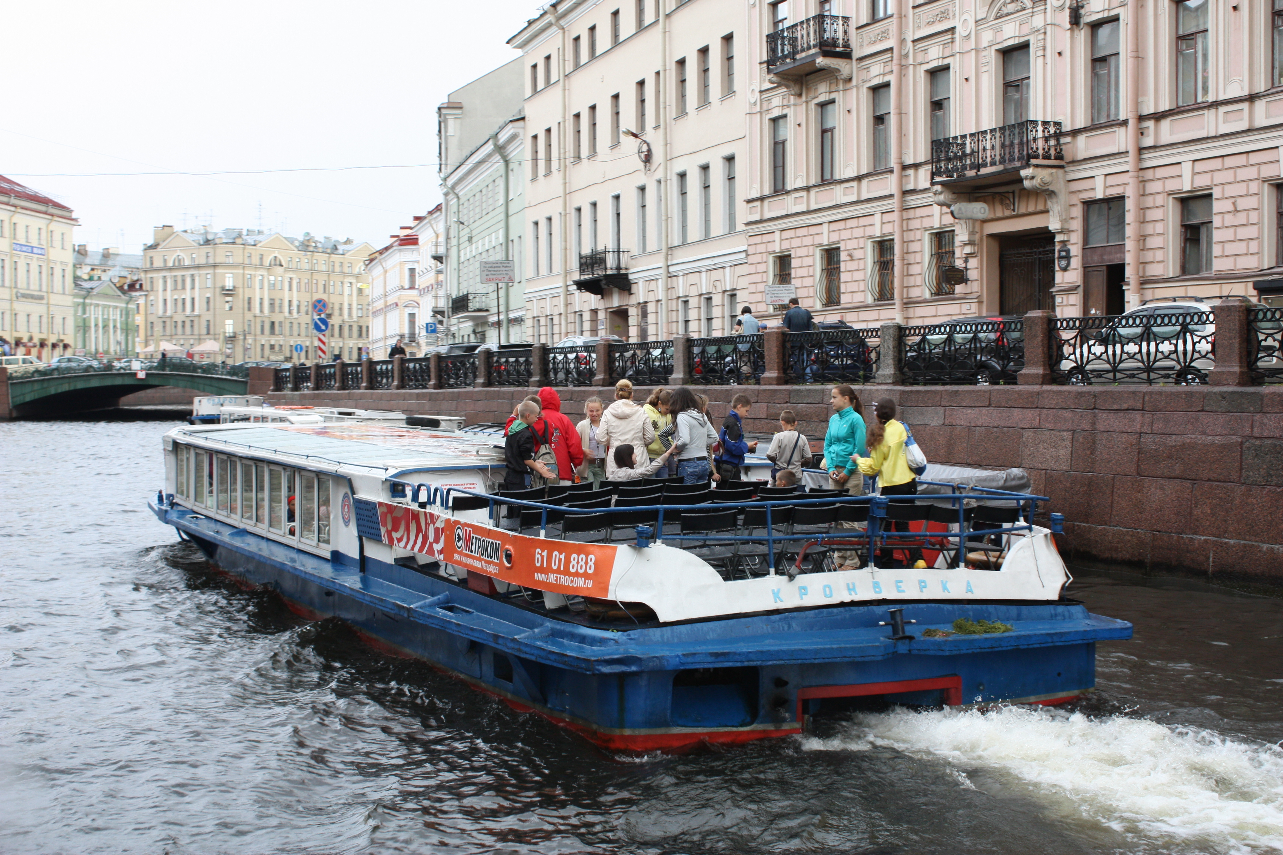 Saint Petersburg 2009 tourist pictures